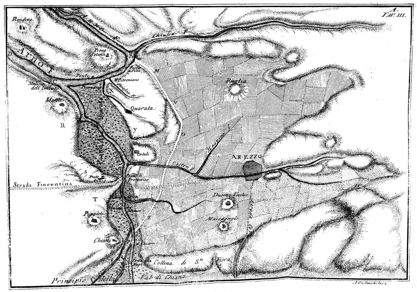 Mappa val di chiana tratta da Memorie idraulico-storiche sopra la Val di Chiana